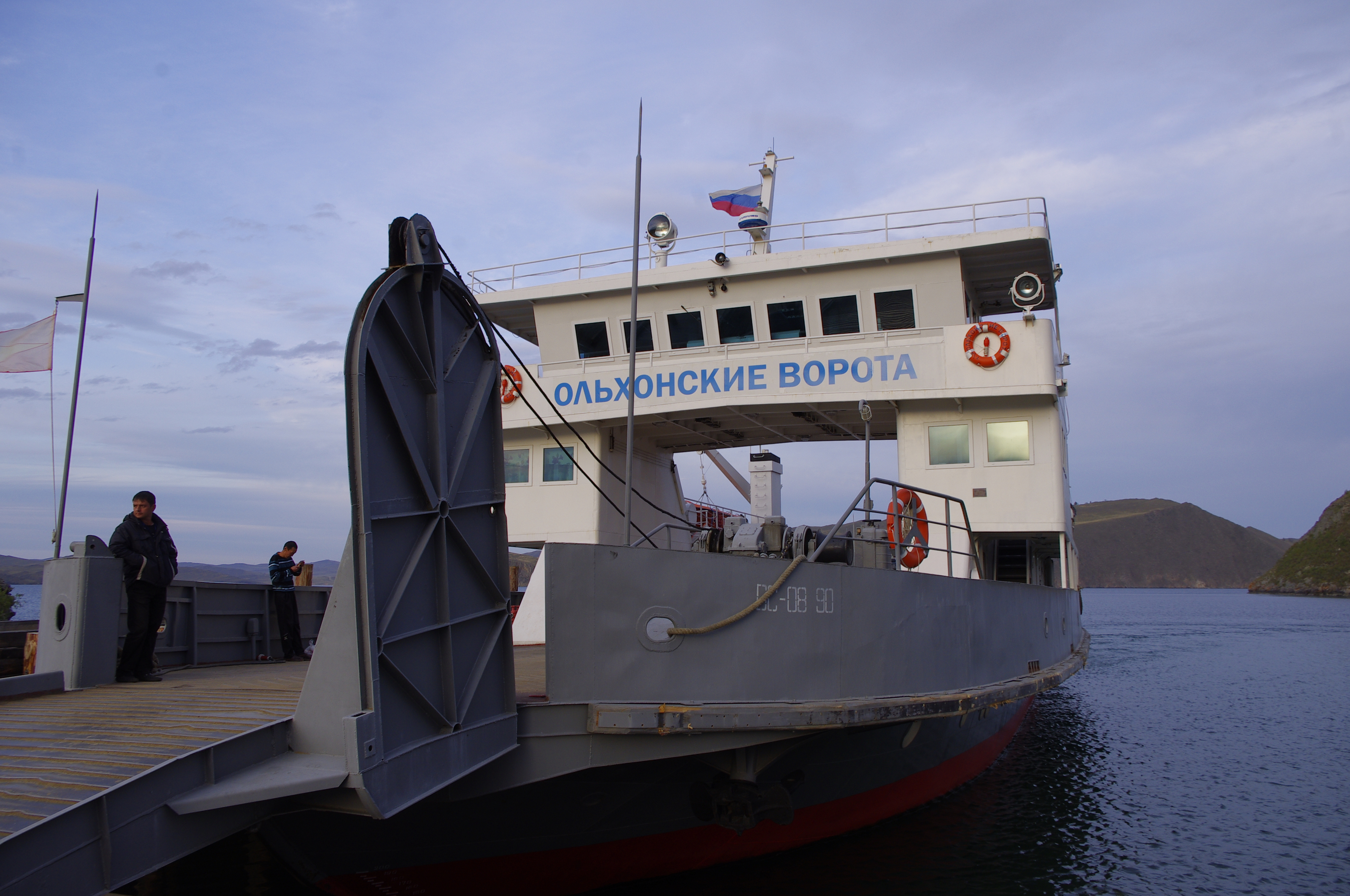 Lato 2013.